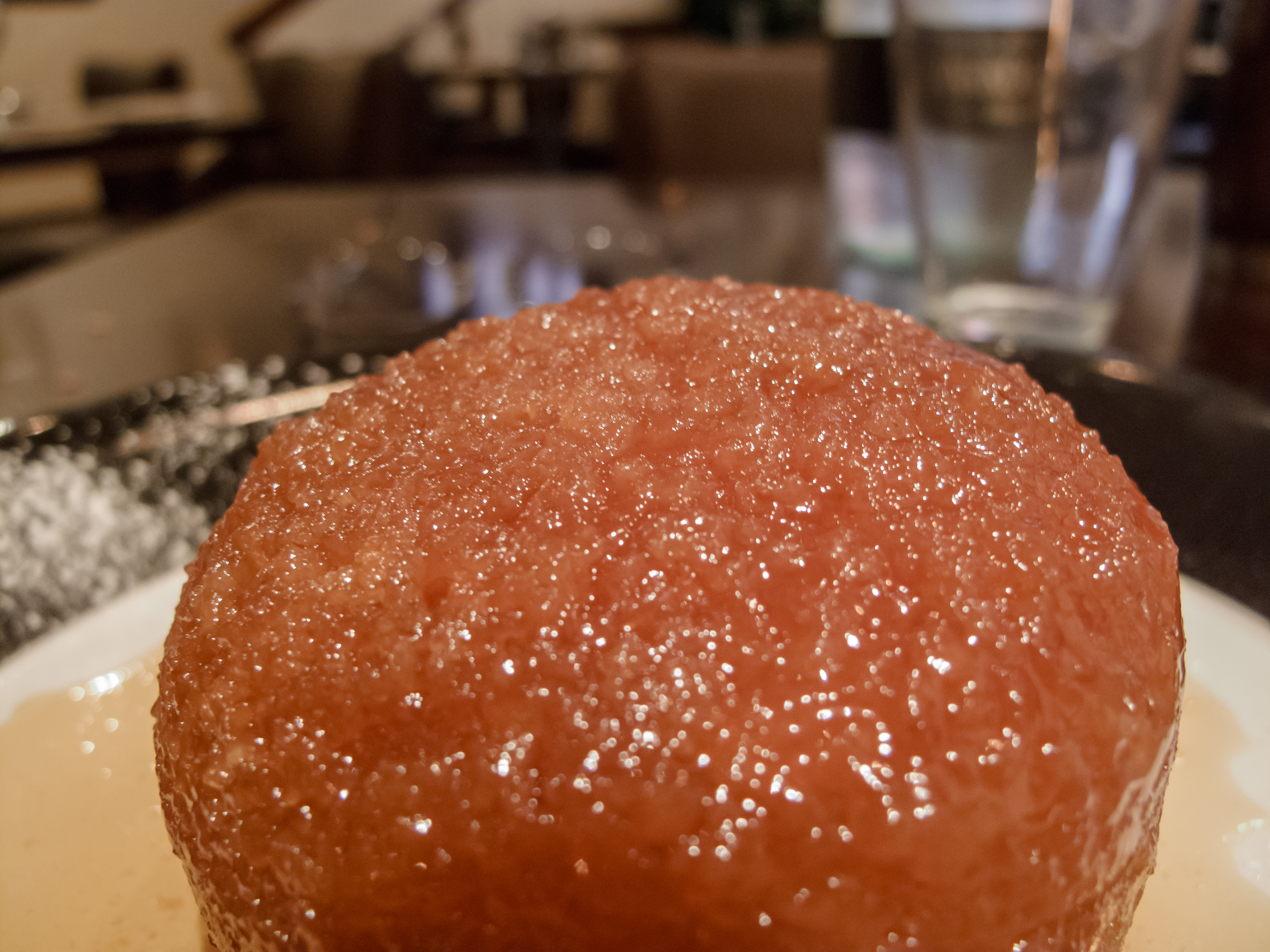 Restaurant, York